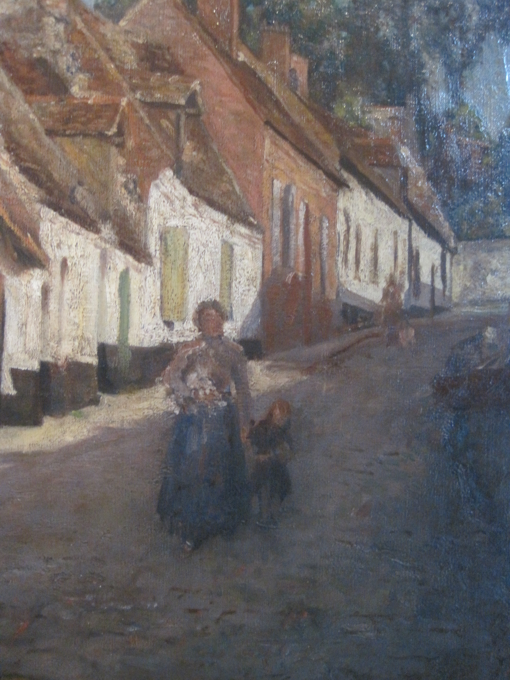 La rue des moulins à Montreuil-sur-Mer, Don au musée Roger Rodière de L. Colling-Mudge